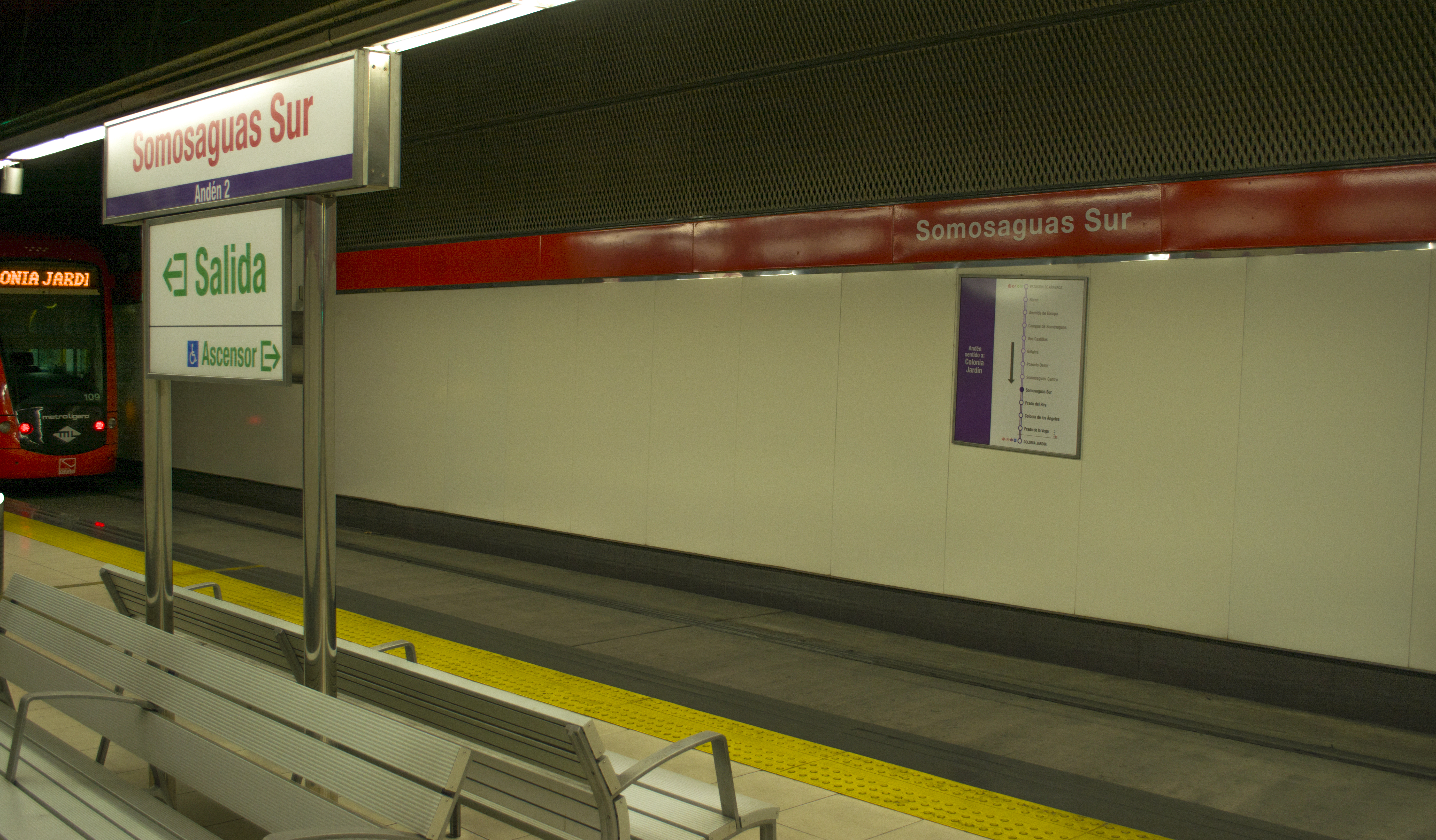 Andén de la estación Somosaguas Sur, de Metro Ligero Madrid, en dirección Colonia Jardín.